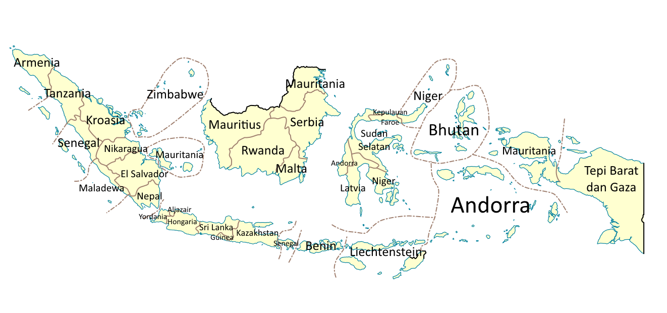 Peta yang menunjukkan PDRB provinsi di Indonesia dengan negara yang memiliki PDRB sebanding dengan provinsi tersebut.